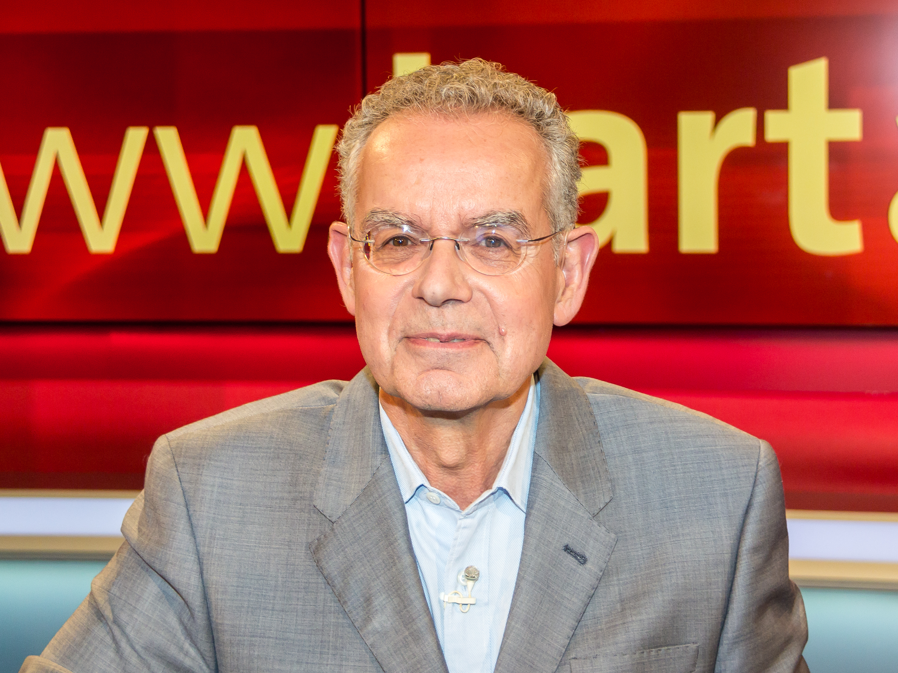 Hart aber Fair, Sendung vom 21. März 2016 zum Thema: „Zocker belohnen, Sparer bestrafen – Zinspolitik gegen die Bürger?“ Foto: Michael Opoczynski, Wirtschafts- und Verbraucherjournalist, langjähriger Moderator des ZDF-Verbrauchermagazins „WISO“